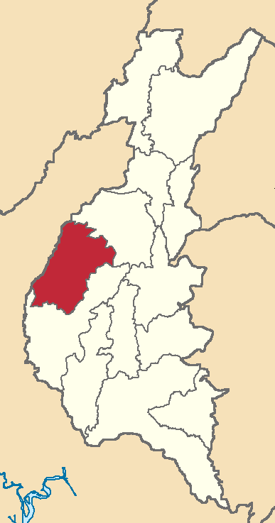 Mapa localizador del cantón en Los Ríos, Ecuador